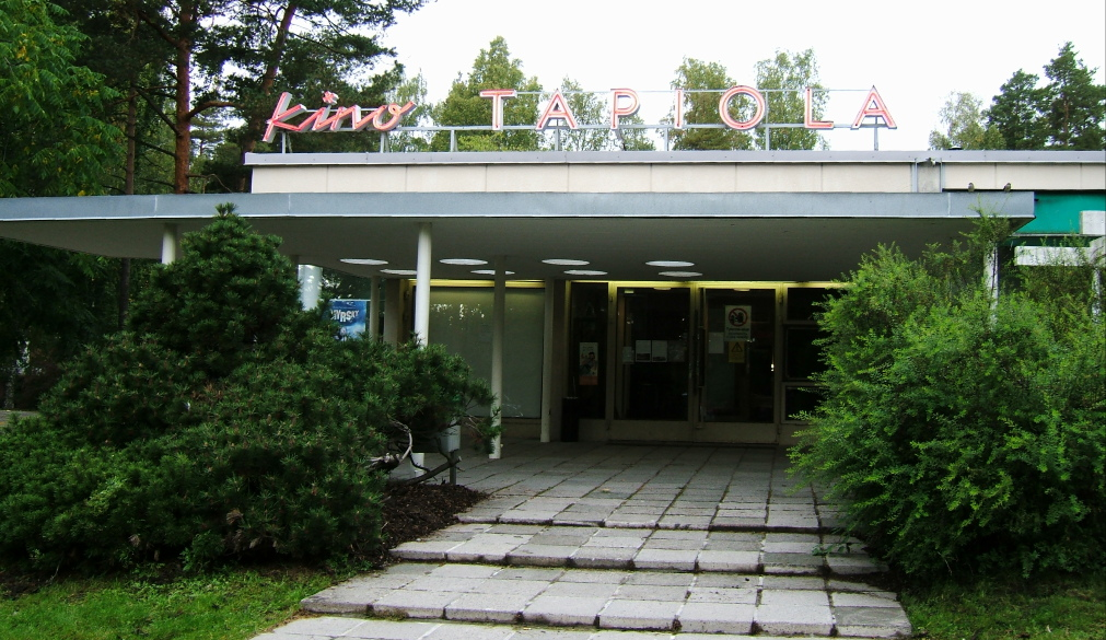 Kino Tapiola Espoon Tapiolassa osoitteessa Mäntyviita 2.